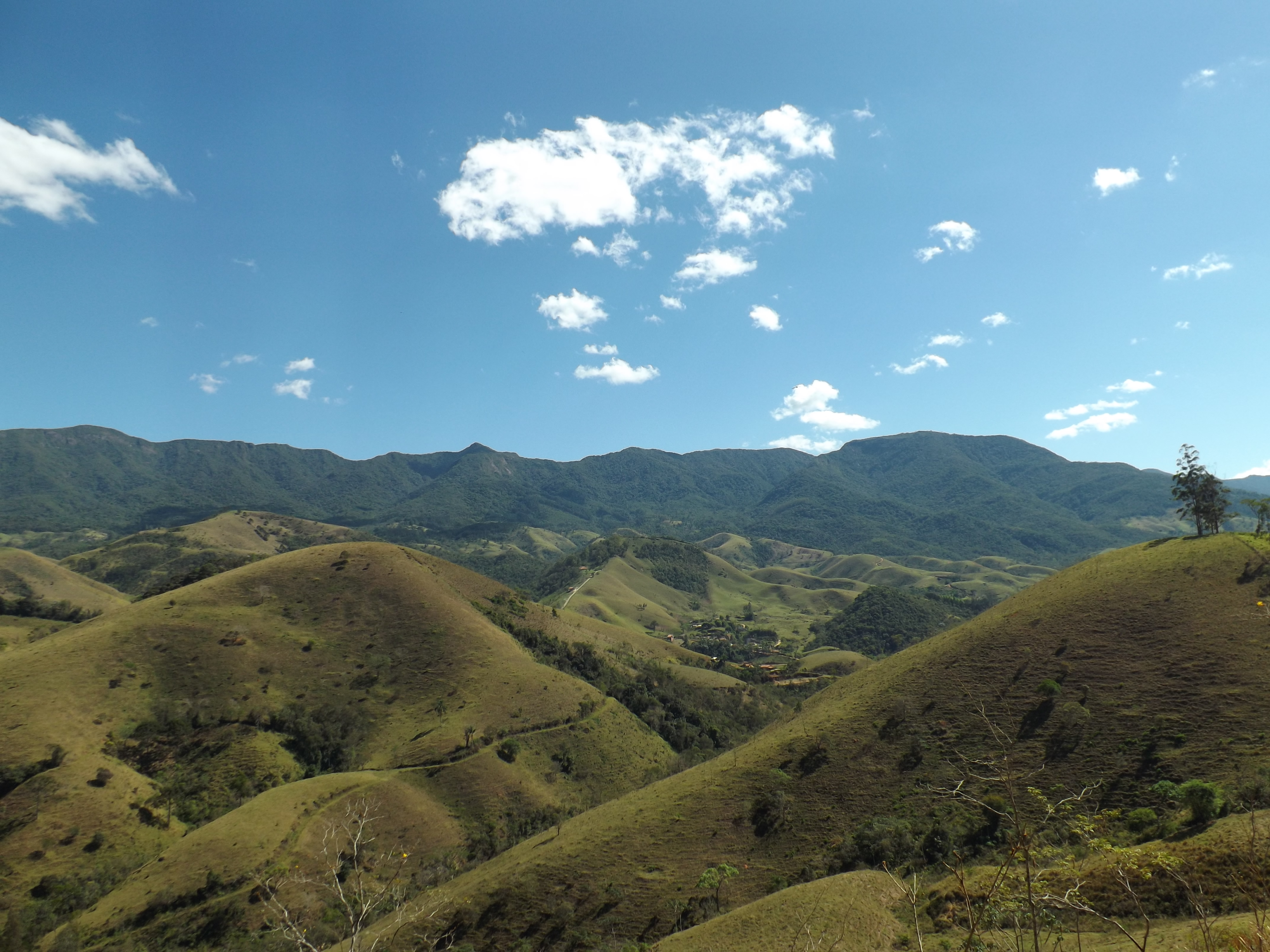 São Francisco Xavier SP